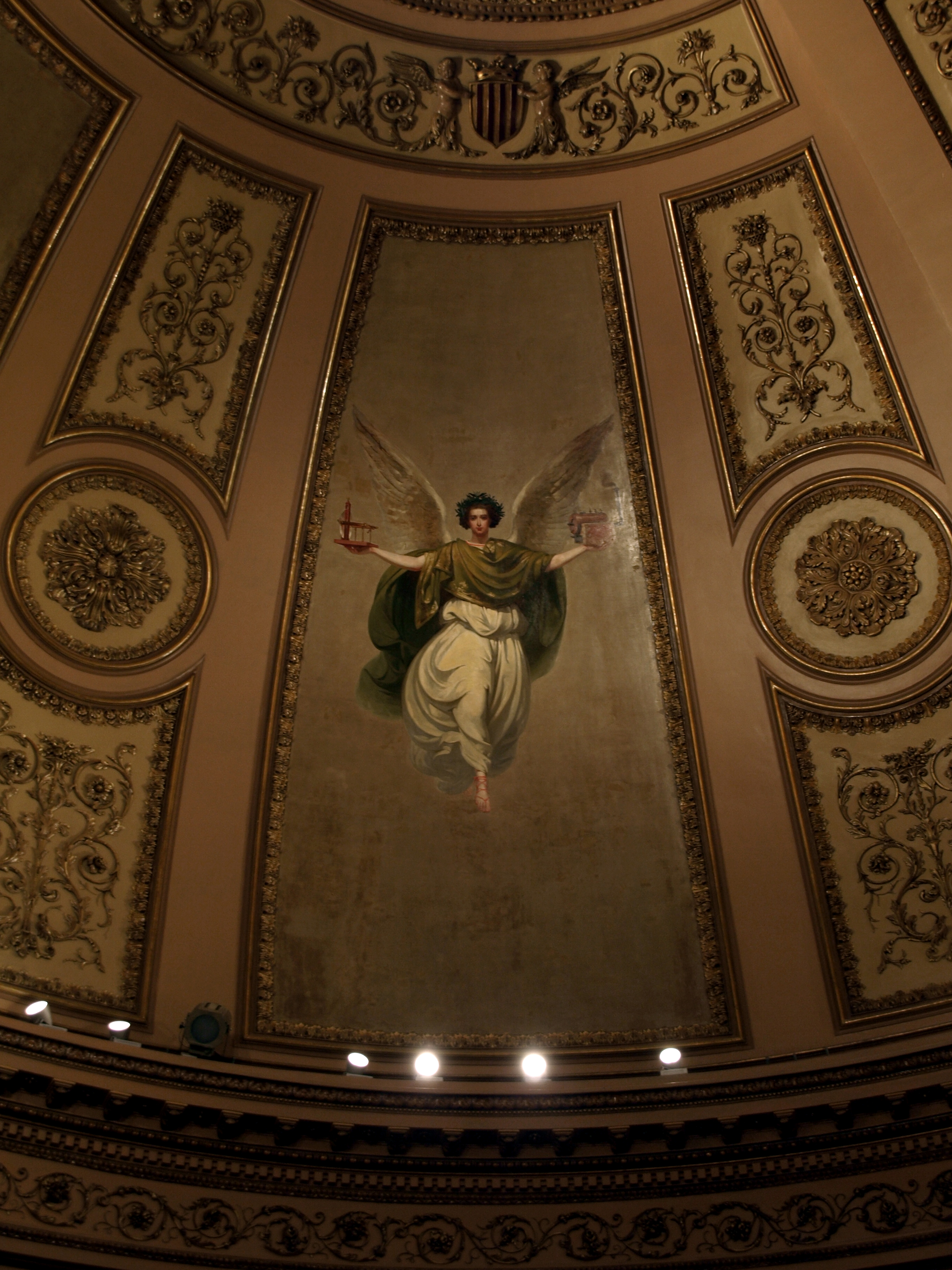 Saló de la Reina Regent (Ajuntament de Barcelona)